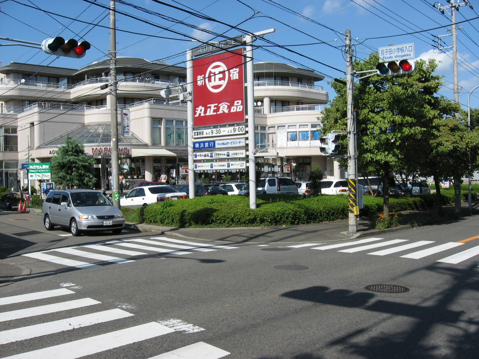 荏子田の風景